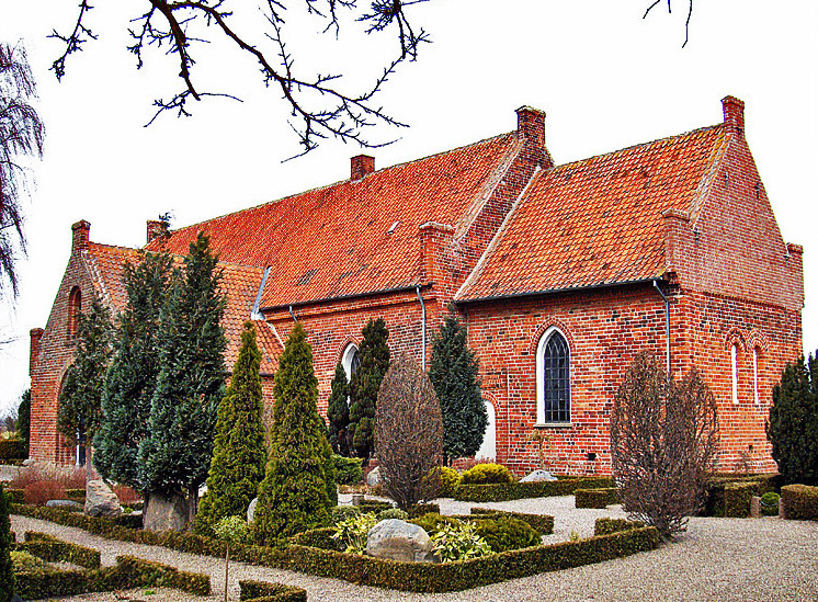 fra sydøst